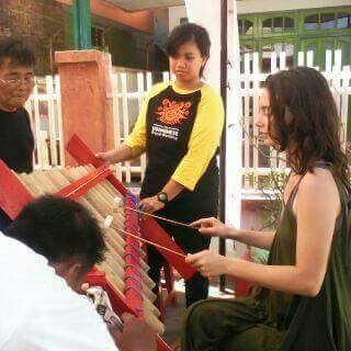 Salah satu jenis paket wisata di Kampong Wisata Temenggungan adalah wisata budaya belajar kesenian tradisional